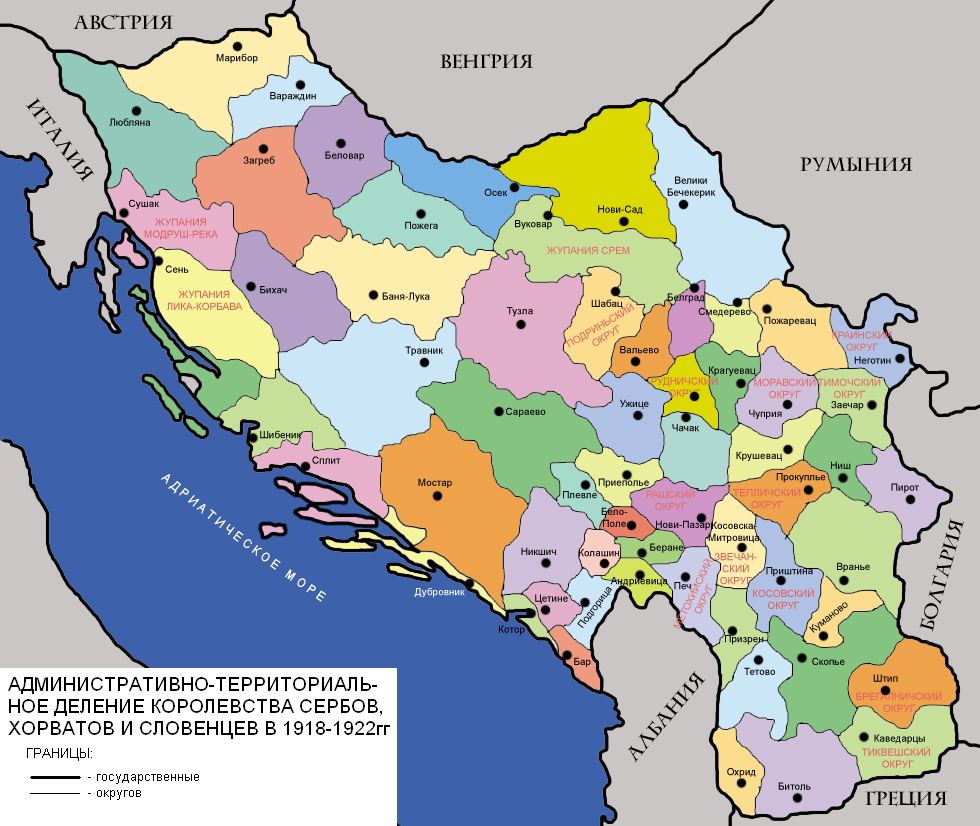 Административно-территориальное деление Королевства сербов, хорватов и словенцев в 1918-1922гг.